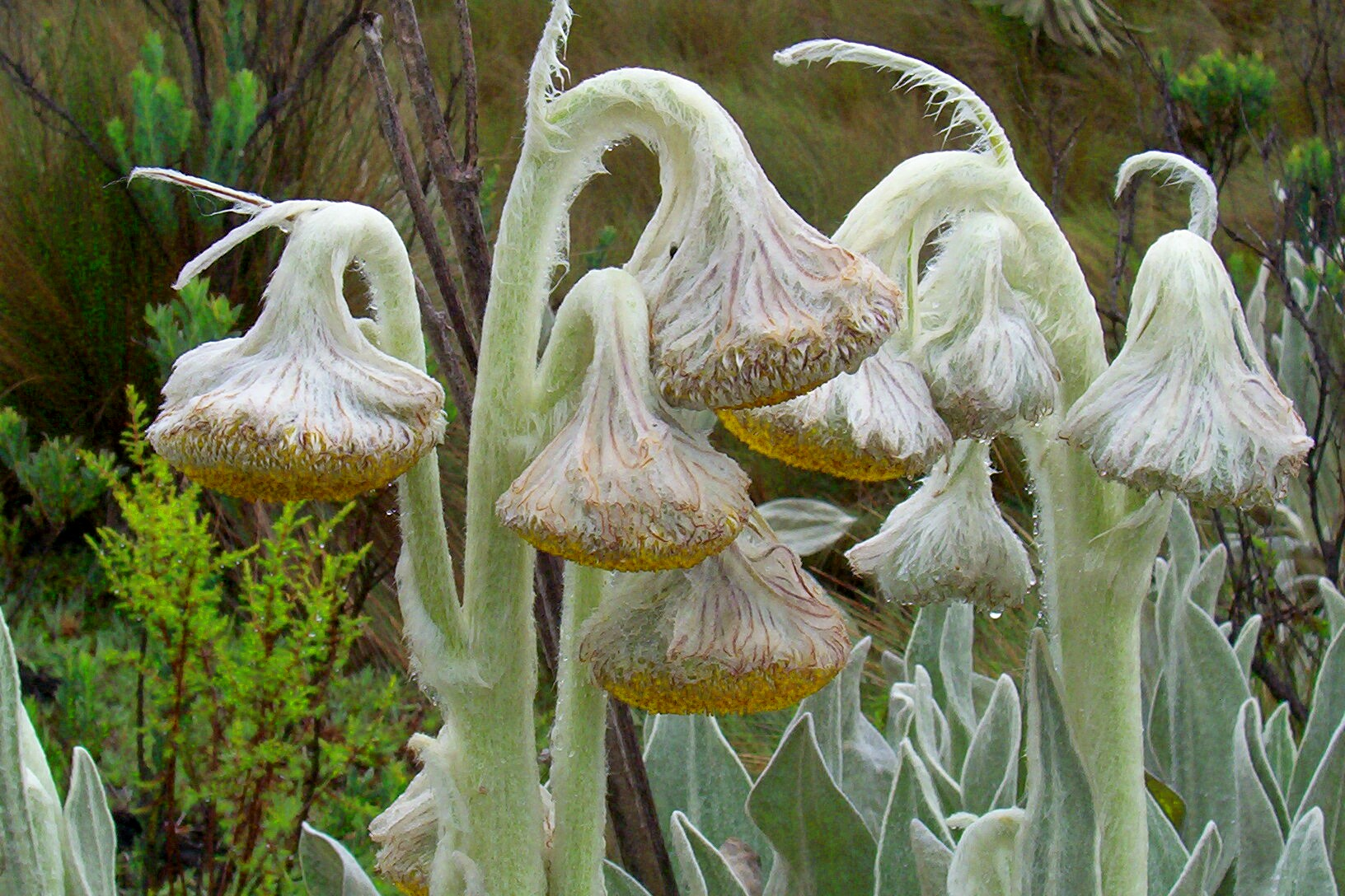 Una planta del género Culcitium que muestra adaptaciones típicas al páramo (Páramo del Chiles, Carchi, Ecuador)